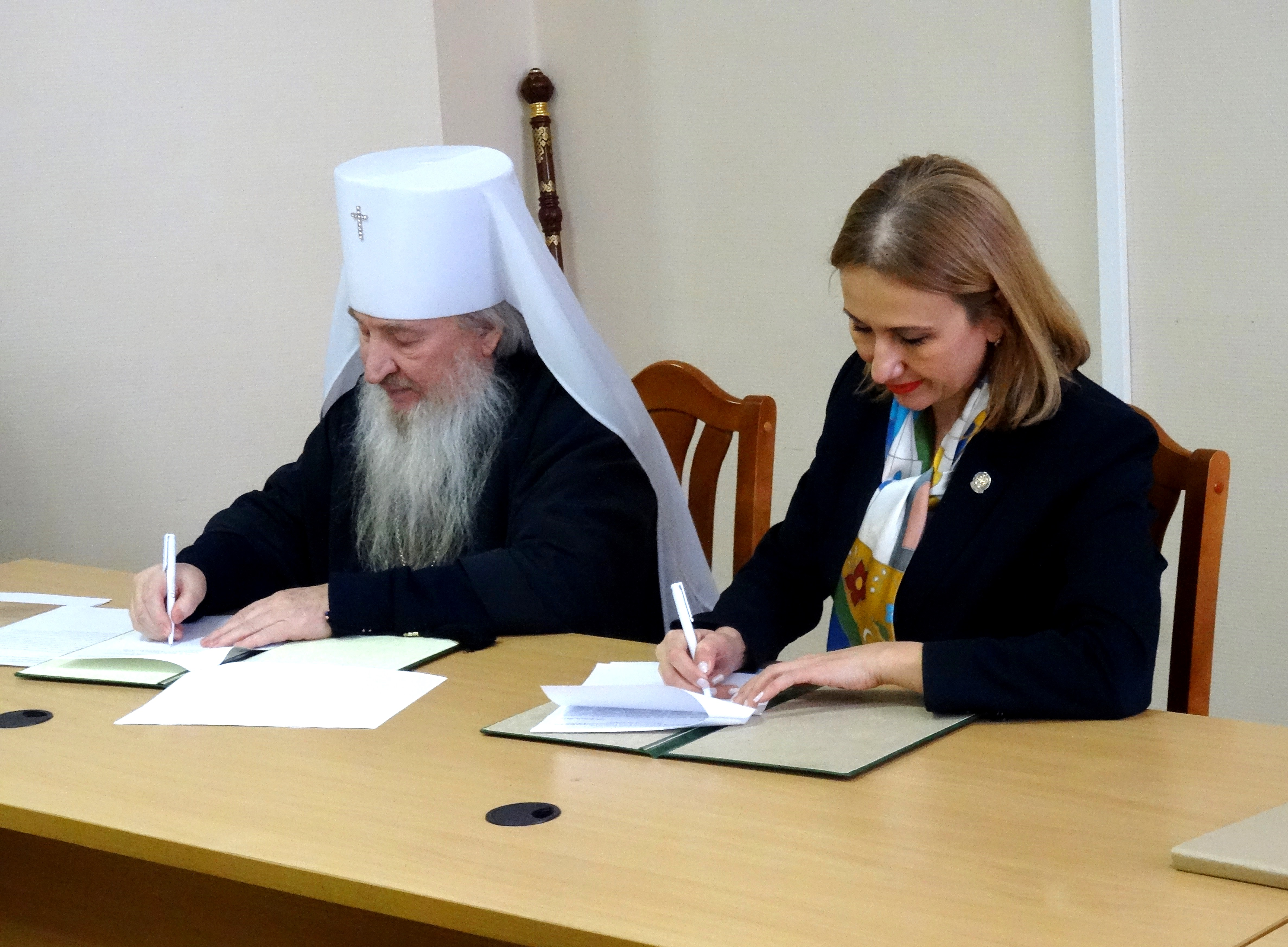 Глава Татарстанской митрополии РПЦ, митрополит Казанский и Татарстанский Феофан (И. А. Ашурков) и председатель Государственного комитета Республики Татарстан по архивного делу И. Х. Аюпова подписывают документы о передаче здания бывшей Николо-Гостинодворской церкви Казанской епархии РПЦ (Казань, 14 февраля 2017 г.).